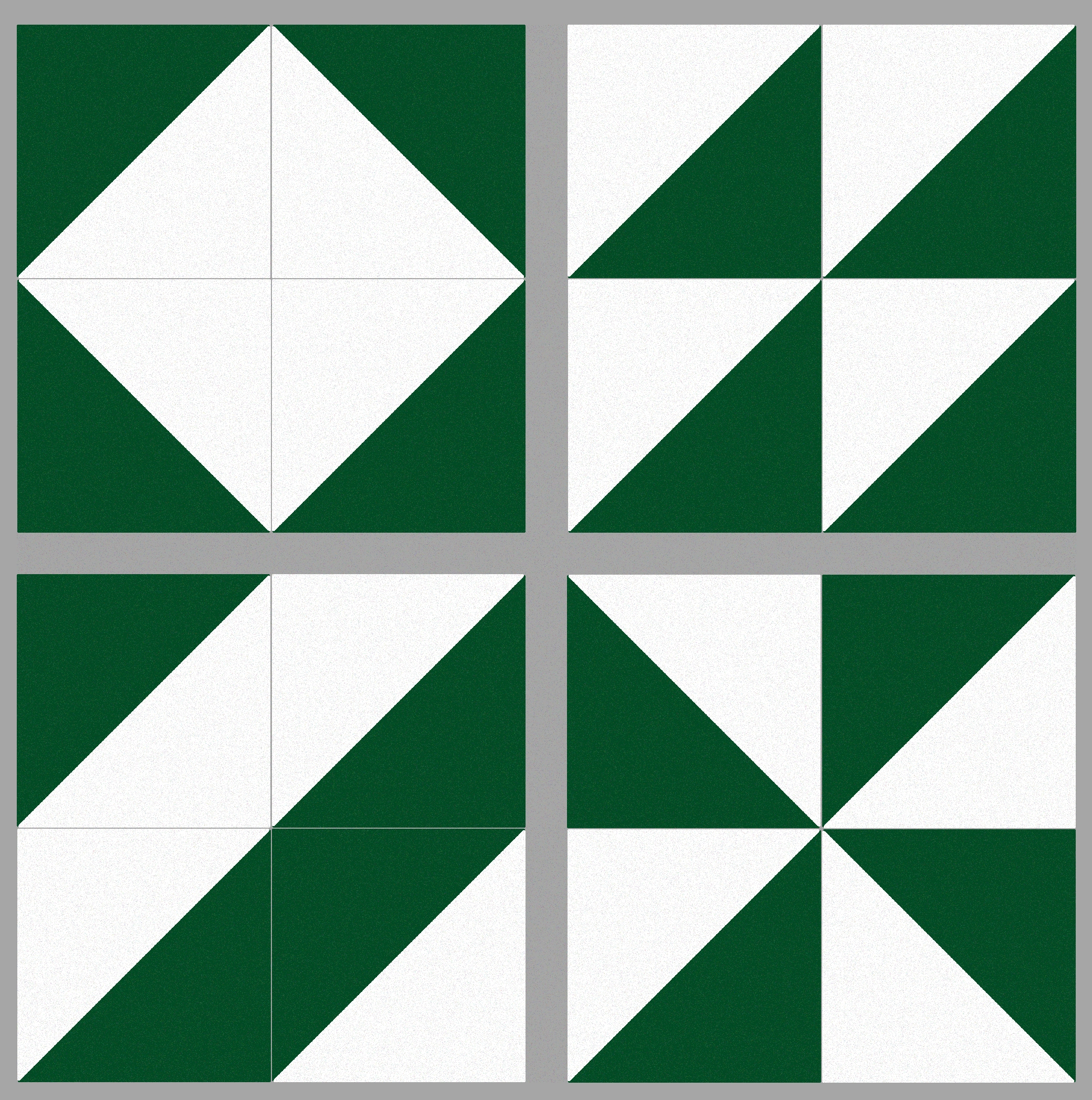 Esquema en el que se muestran algunos de los patrones que pueden formarse con los azulejos de cartabón